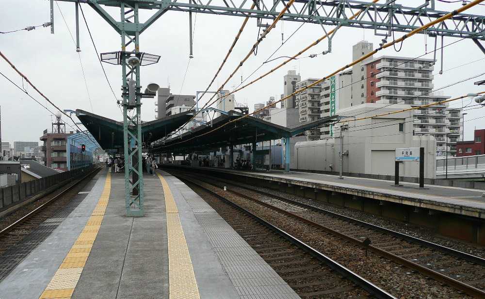 京急本線ja:平和島駅ホーム 投稿者↑PON（ウエポン）が2007年7月7日に撮影 一部編集の上で2007年7月24日 (火) 16:47 (UTC)にアップロード